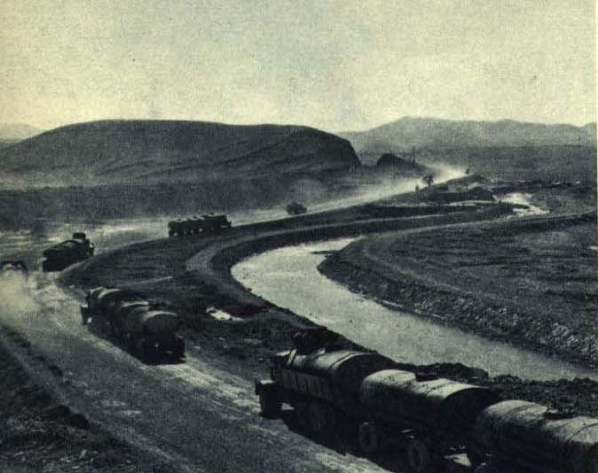 1962-07 1962年 克拉玛依原油运输